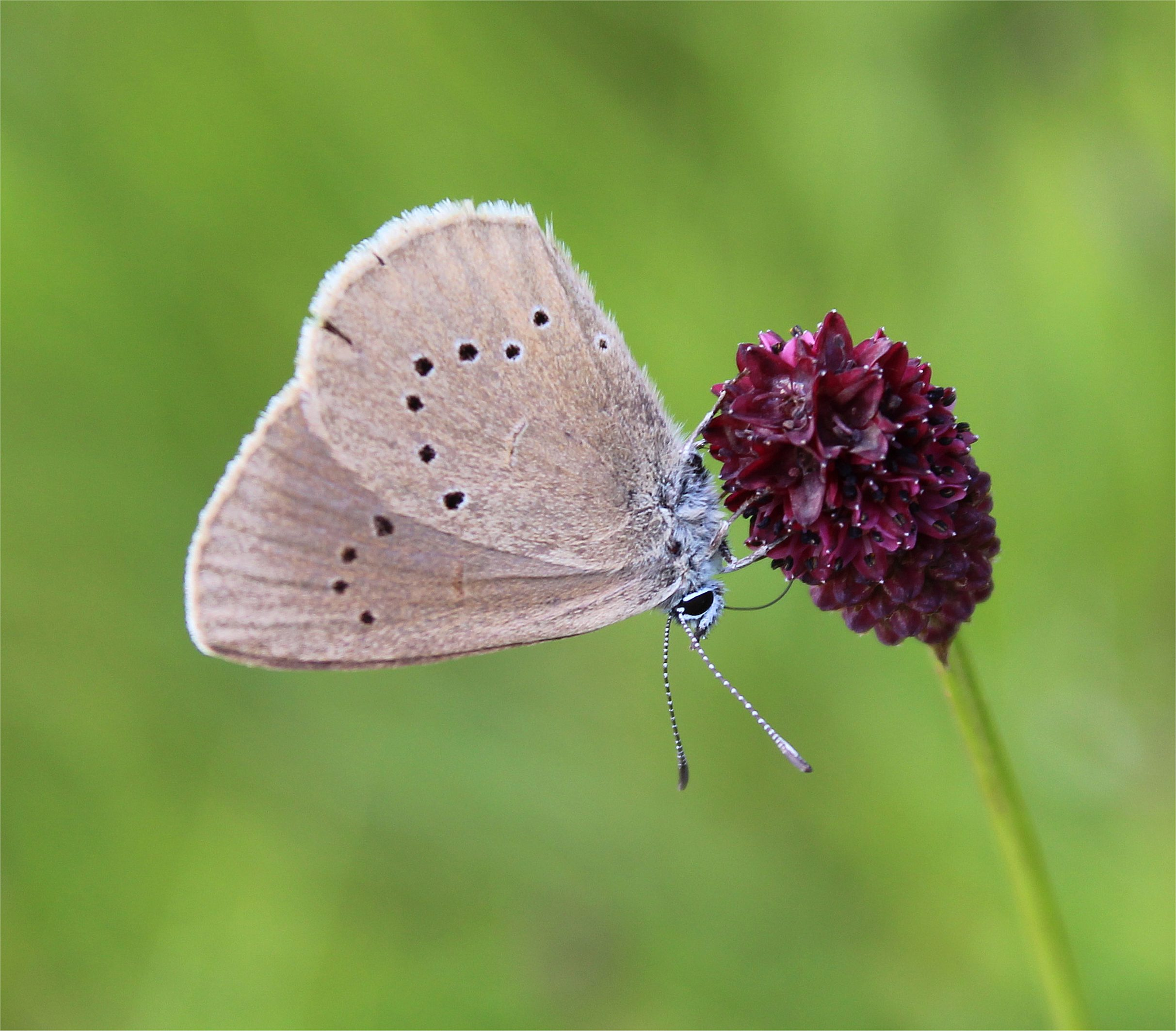 Ameisenbläuling an Großem Wiesenknopf